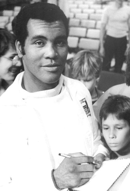 Teofilo Stevenson ADN-ZB Settnik 4.10.85 Berlin: XVI. Internationales Boxturnier von Berlin-Der dreifache Olympiasieger und zweifache Weltmeister Teofilo Stevenson (Kuba) greift am 6.10.85 im Halbfinale der Superschwergewichtler ins Ringgeschehen ein. Bei seinem Erscheinen in der Werner-Seelenbinder-Halle ist er bis dahin ständig von Autogrammjägern umringt.